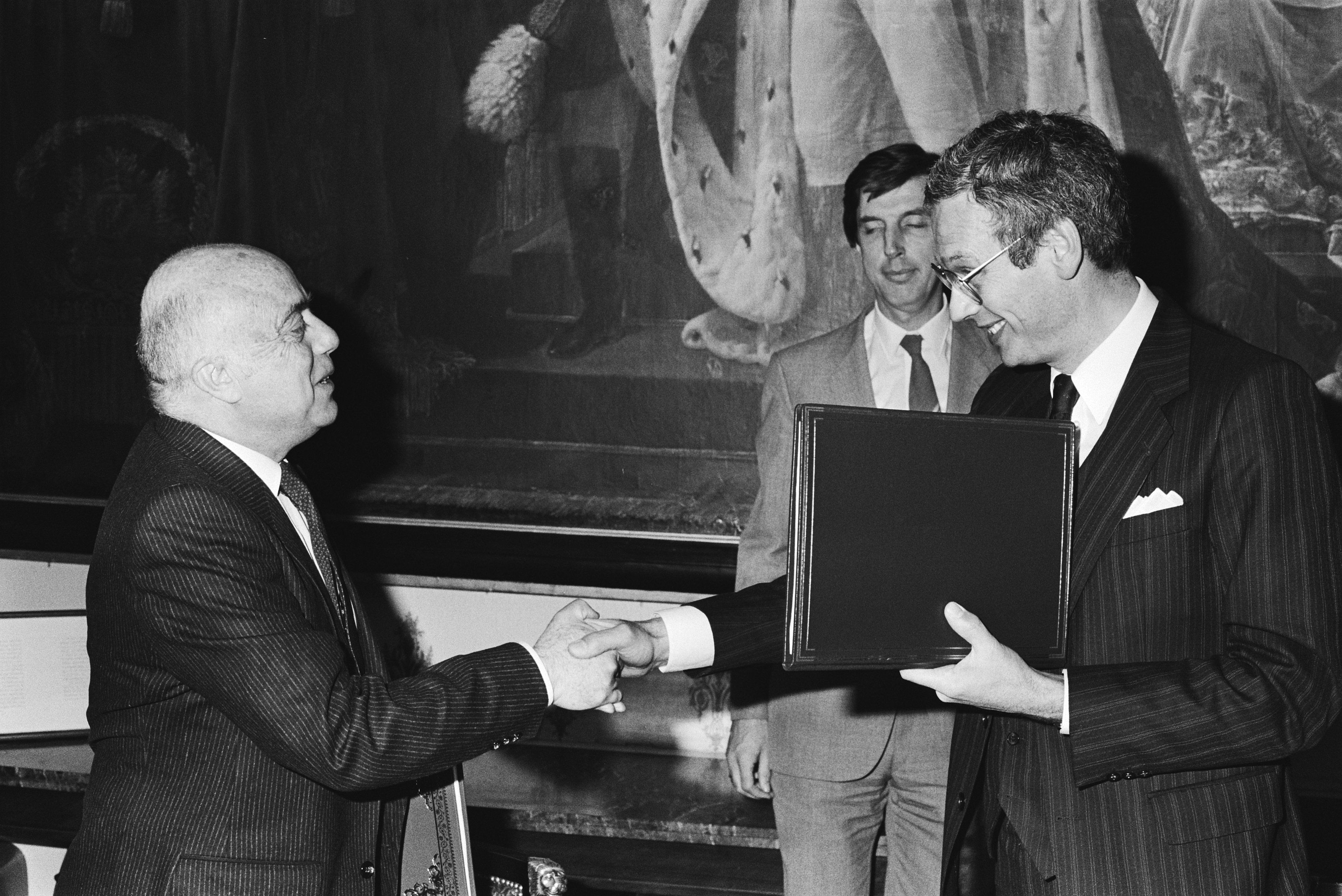 Collectie / Archief : Fotocollectie Anefo Reportage / Serie : Ondertekening van het cultureel verdrag tussen Marokko en Nederland Beschrijving : Minister Van den Broek (Buitenlandse Zaken) (r) en de Marokkaanse minister Laraki (Onderwijs) Datum : 24 februari 1983 Locatie : Den Haag, Zuid-Holland Trefwoorden : culturele betrekkinge, handen schudden, internationale akkoorden Persoonsnaam : Broek, Hans van den Fotograaf : Antonisse, Marcel / Anefo Auteursrechthebbende : Nationaal Archief Materiaalsoort : Negatief (zwart/wit) Nummer archiefinventaris : bekijk toegang 2.24.01.05 Bestanddeelnummer : 932-5113